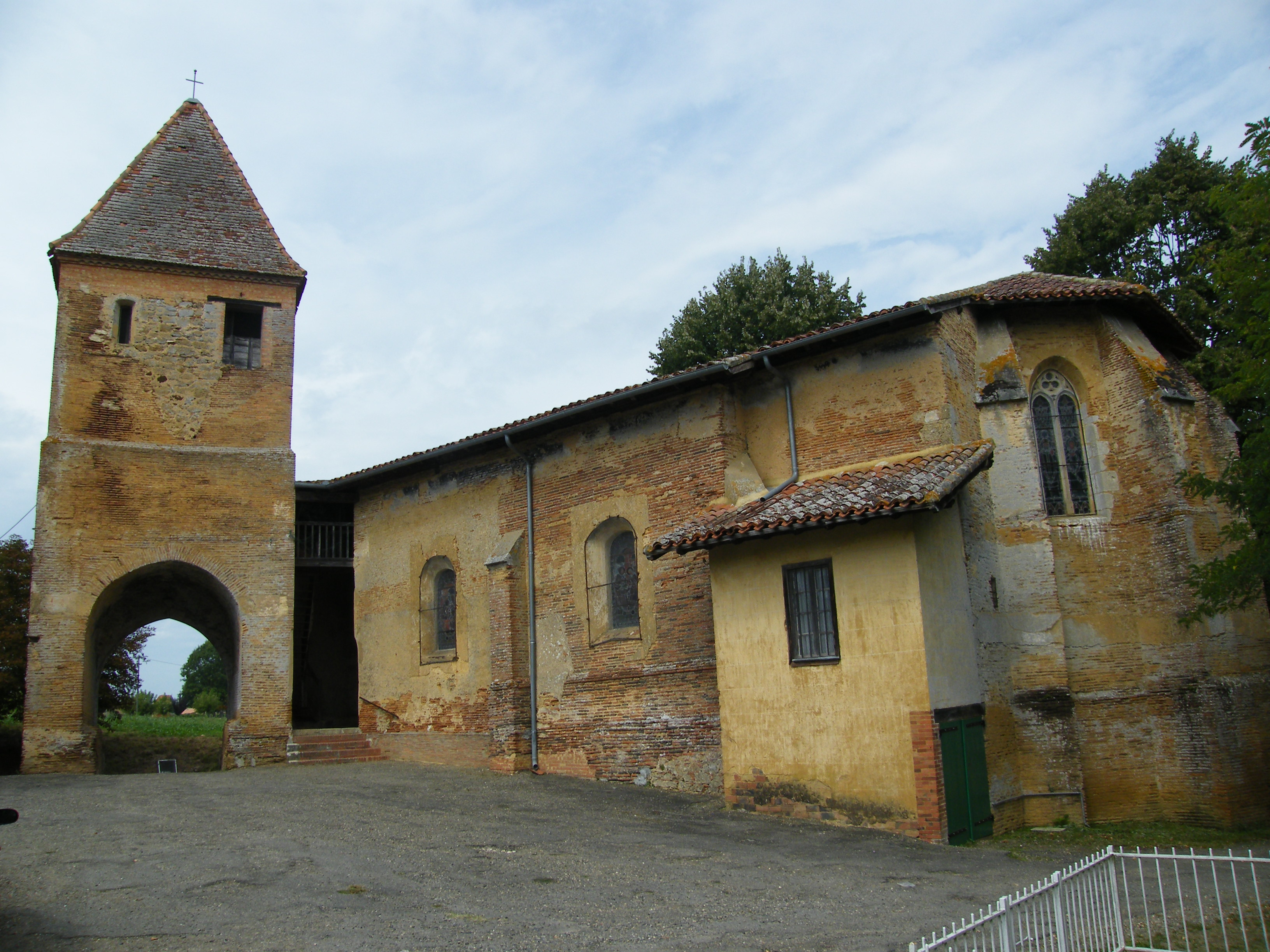 Église de Toujouse